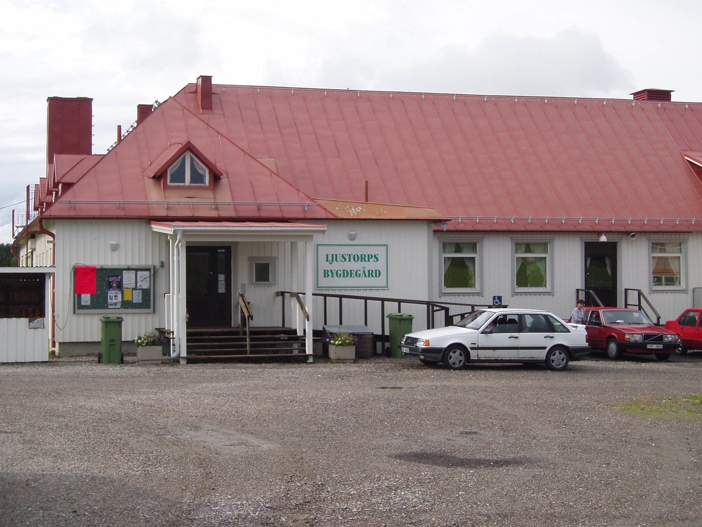 En bild på Ljustorps bygdegård 2005